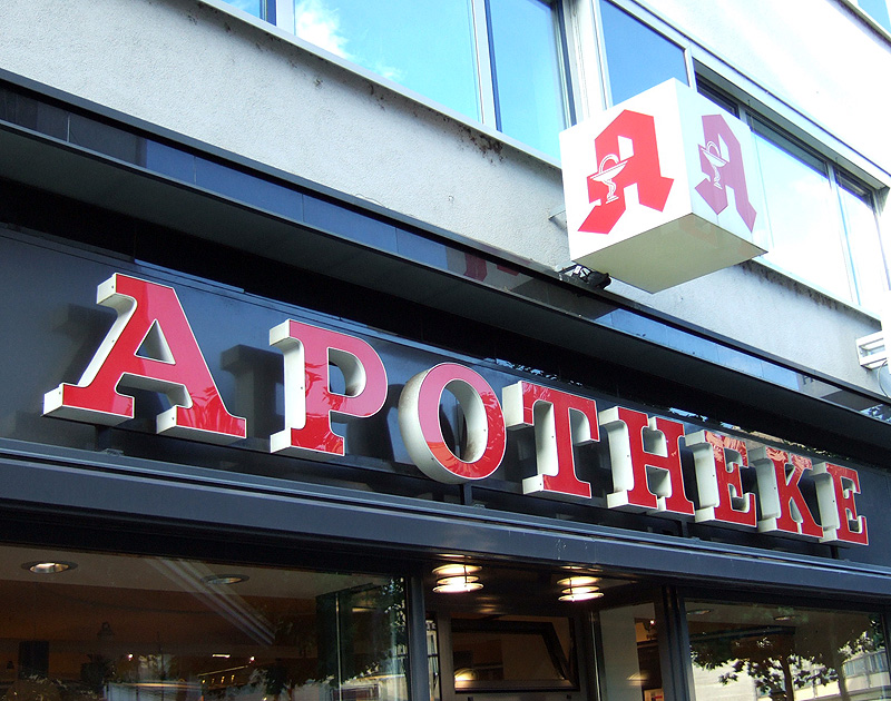 Apotheken Logo in Schriftzug. Bemerkt eine Apotheke bei einem Arzneimittel Qualitätsmängel, Nebenwirkungen oder einen Missbrauch, meldet sie dies an die Arzneimittelkommission. Die AMK sammelt und bewertet diese Meldungen.